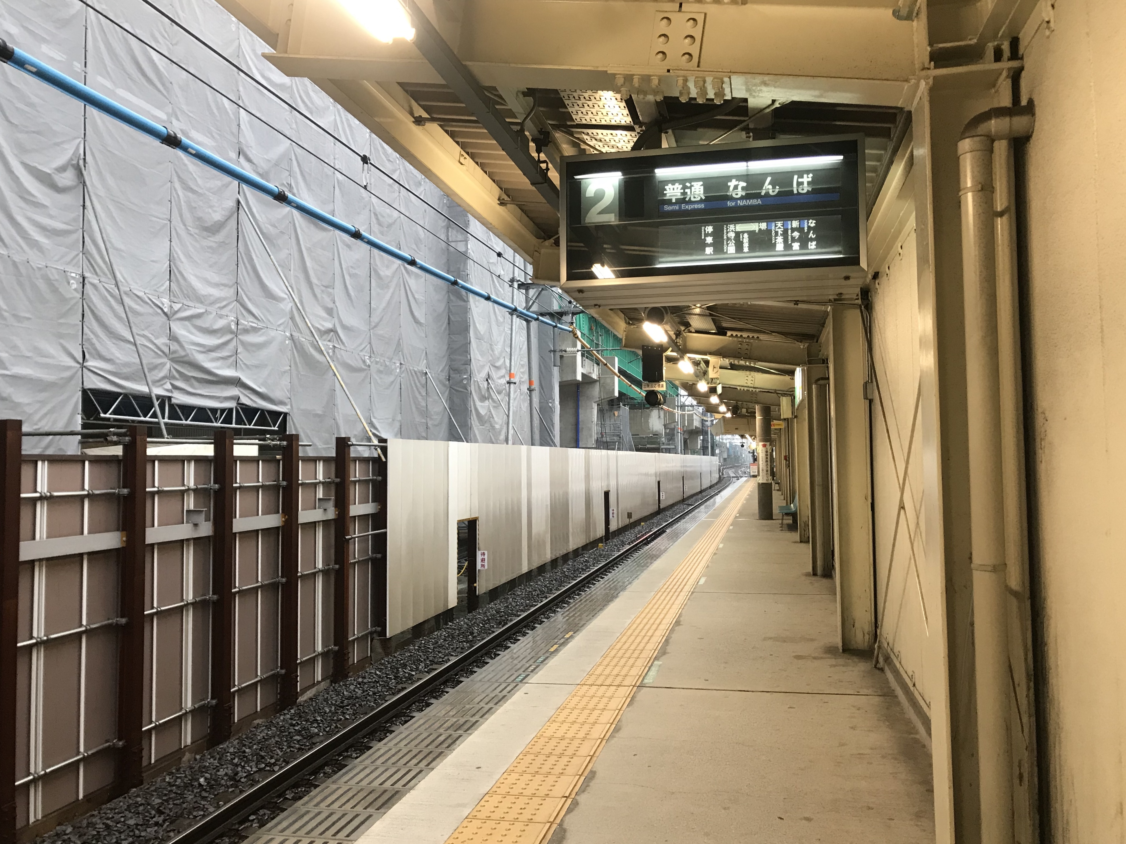 羽衣駅の高師浜線ホーム(奥は高石方面)